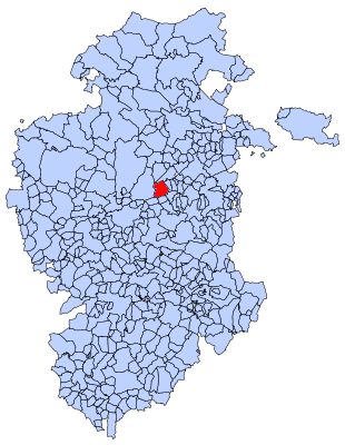 Monasterio de Rodilla en Burgos